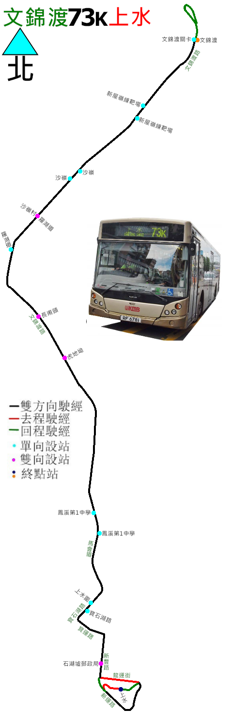 中文（香港）: 九巴73K線的走線圖